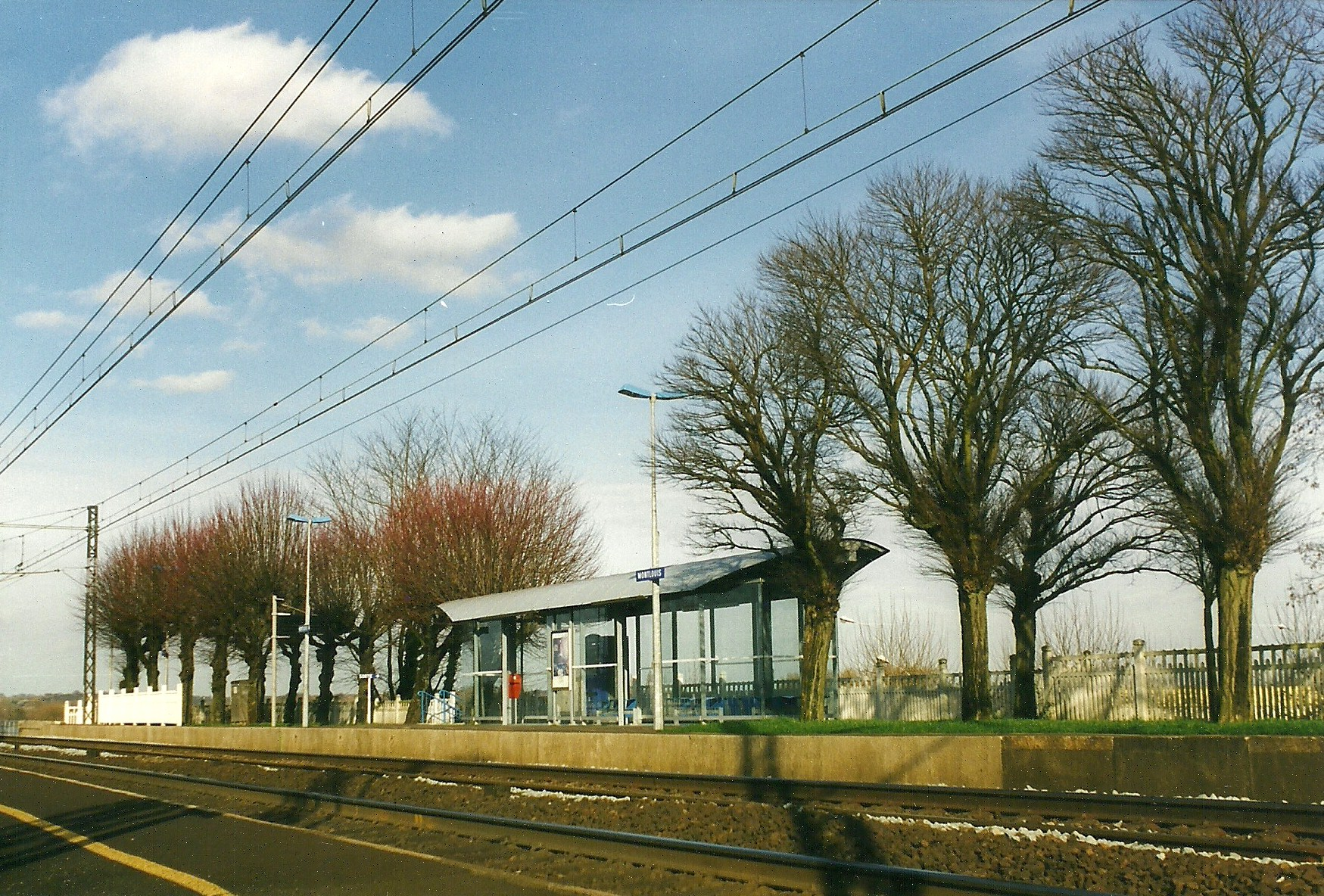 Gare de Montlouis, commune de Montlouis-sur-Loire, France